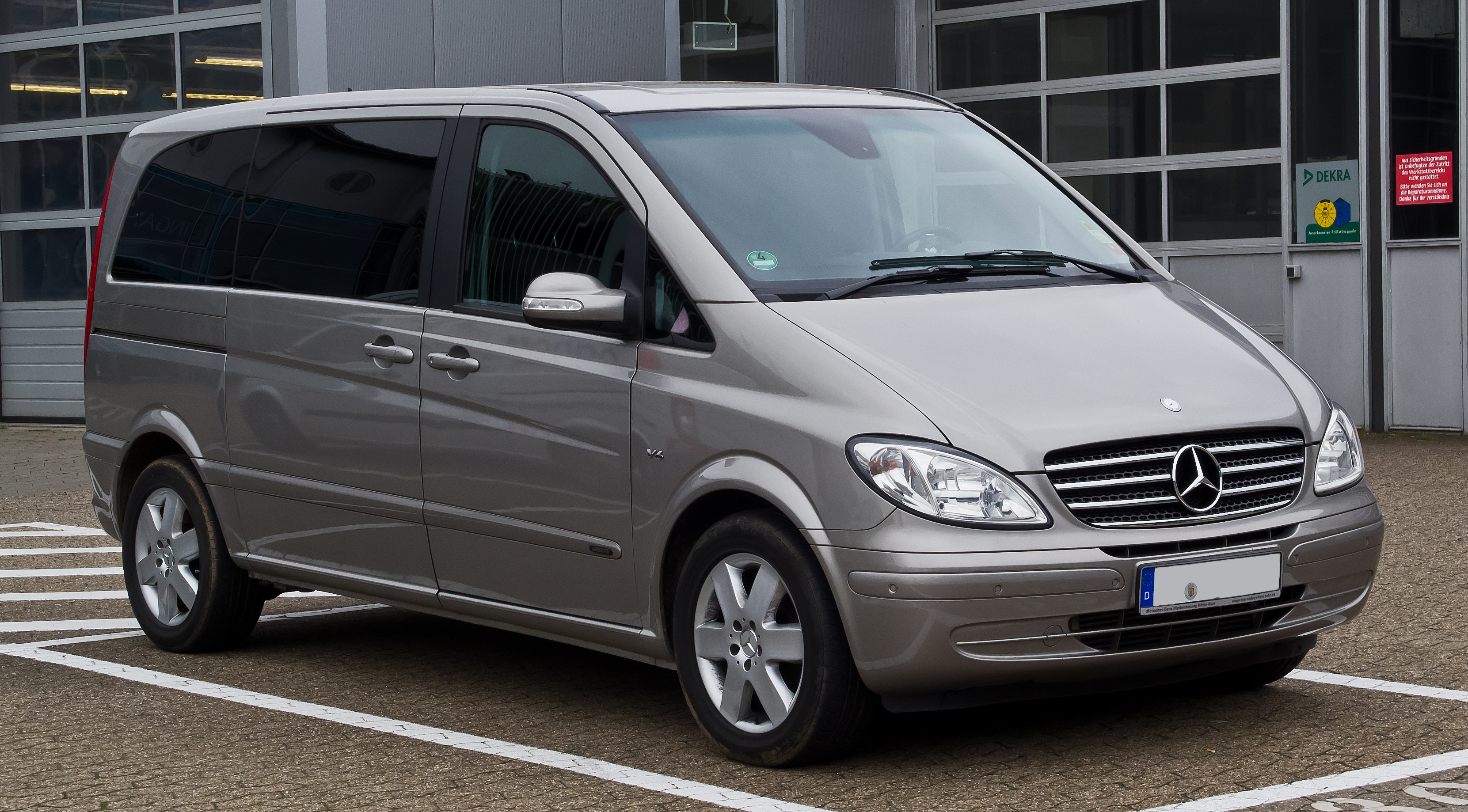 Mercedes-Benz Viano Kompakt CDI 3.0 V6 Ambiente (W 639)